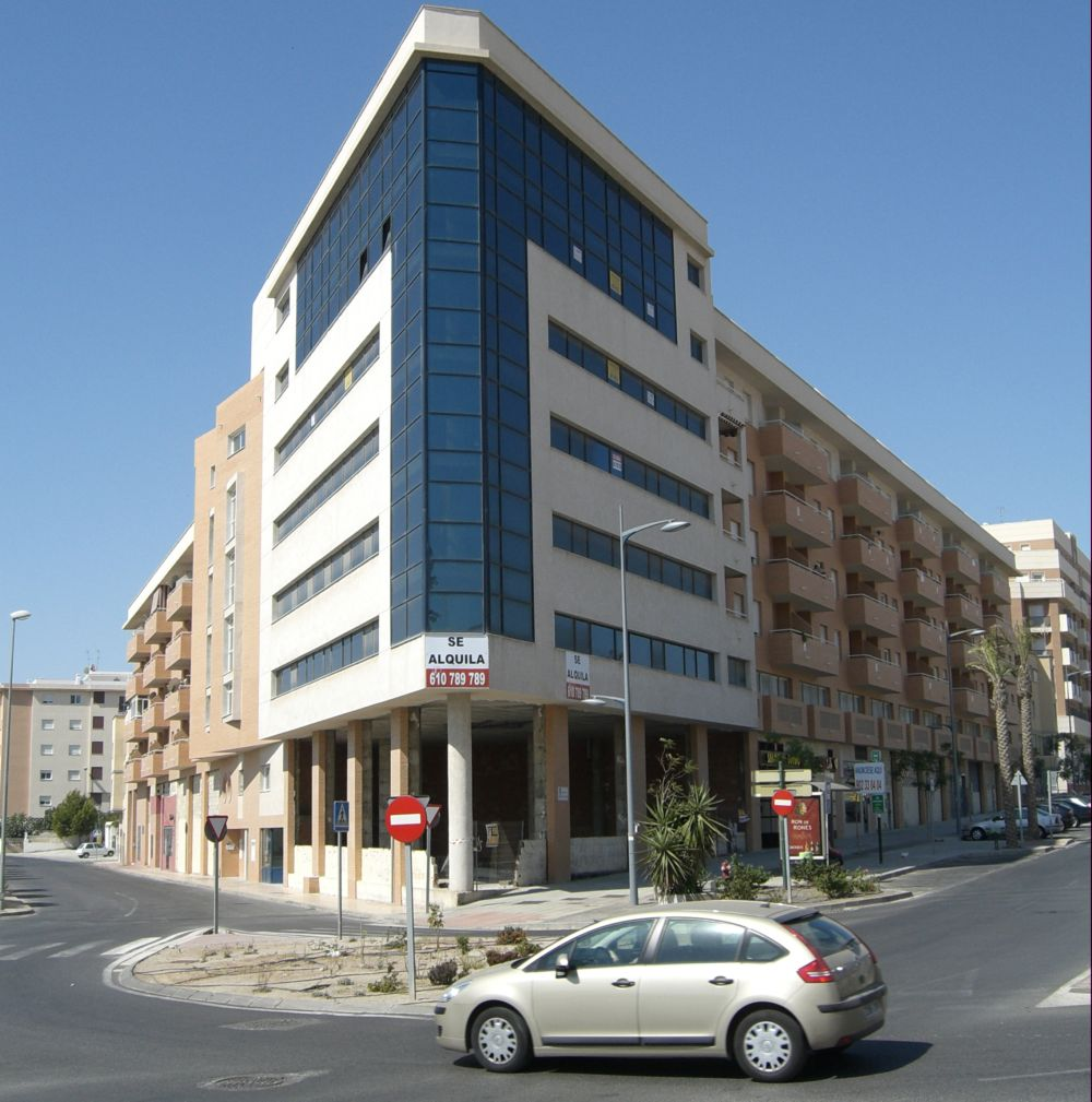 Fotografía del Edificio singular "Puerta de Vícar", en la entrada del municipio español de Vícar, provincia de Almería.